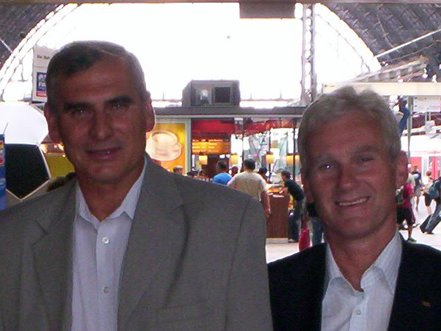 Paweł Janas i Michał Listkiewicz na dworcu kolejowym we Frankfurcie nad Menem